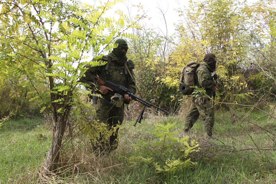 Боевая подготовка военнослужащих 22-й отдельной бригады специального назначения.